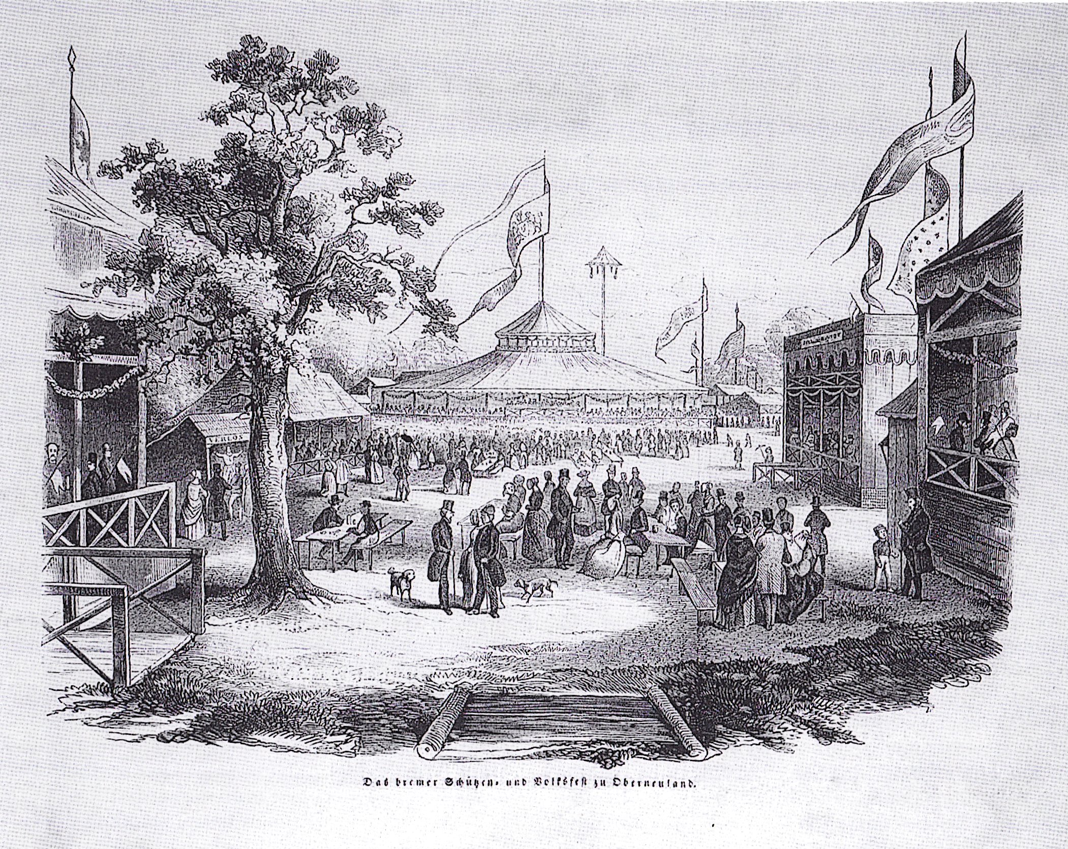 Titel: Das Bremer Schützen- und Volksfest zu Oberneuland, Holzstich-Illustration von 1846. Wurde von der in Leipzig erscheinenden Illustrirte Zeitung zur Illustrierung eines Berichts über das Bremer Schützen- und Volksfest zu Oberneuland verwendet, das im Jahr 1846 in Oberneuland bei Bremen stattfand.